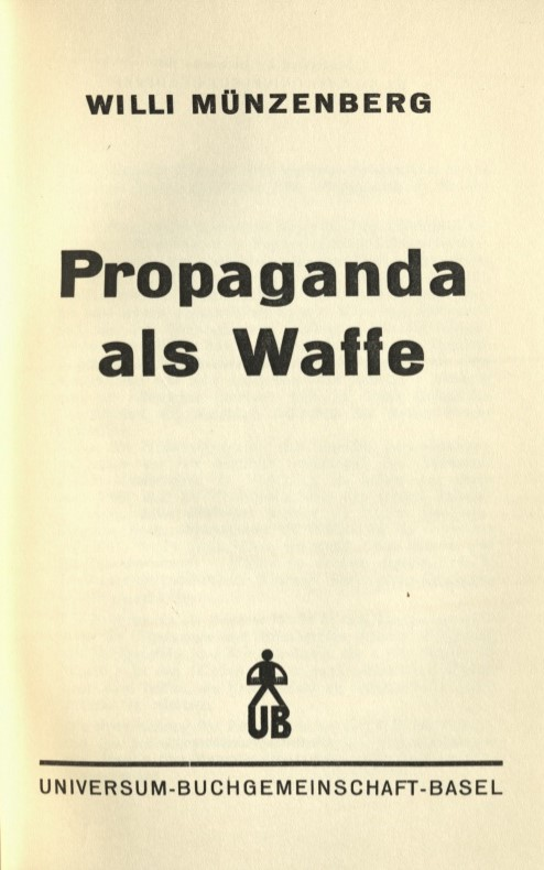 Willi Münzenberg, Propaganda als Waffe, Universum-Buchgemeinschaft Basel, 1937. Titelblatt. Sonderband der Jahresreihe 1937. 274. Band der Universum-Bücherei